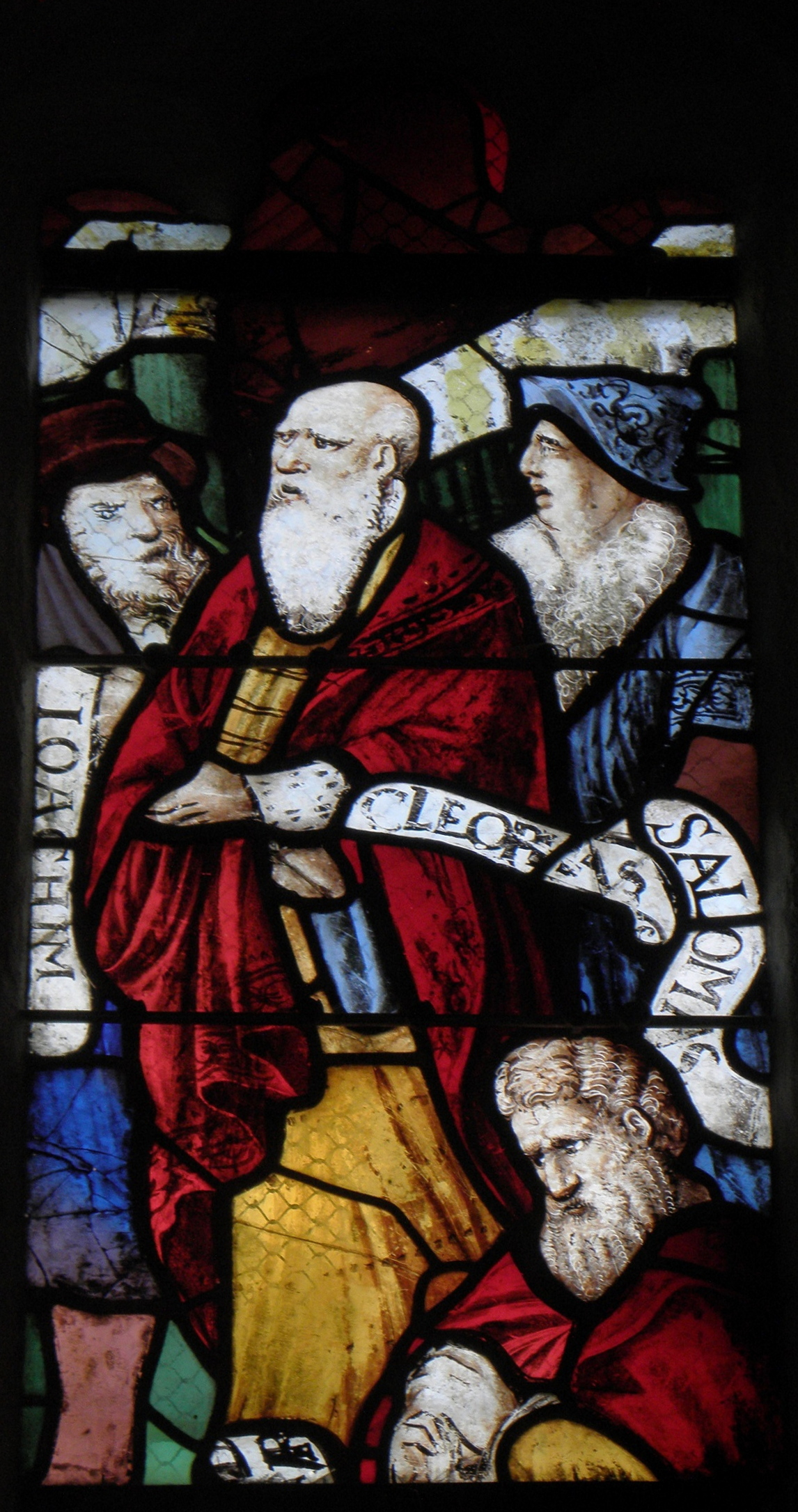 Vitrail de la Sainte Parenté de la chapelle Saint-Fiacre du Faouët (56). Détail.